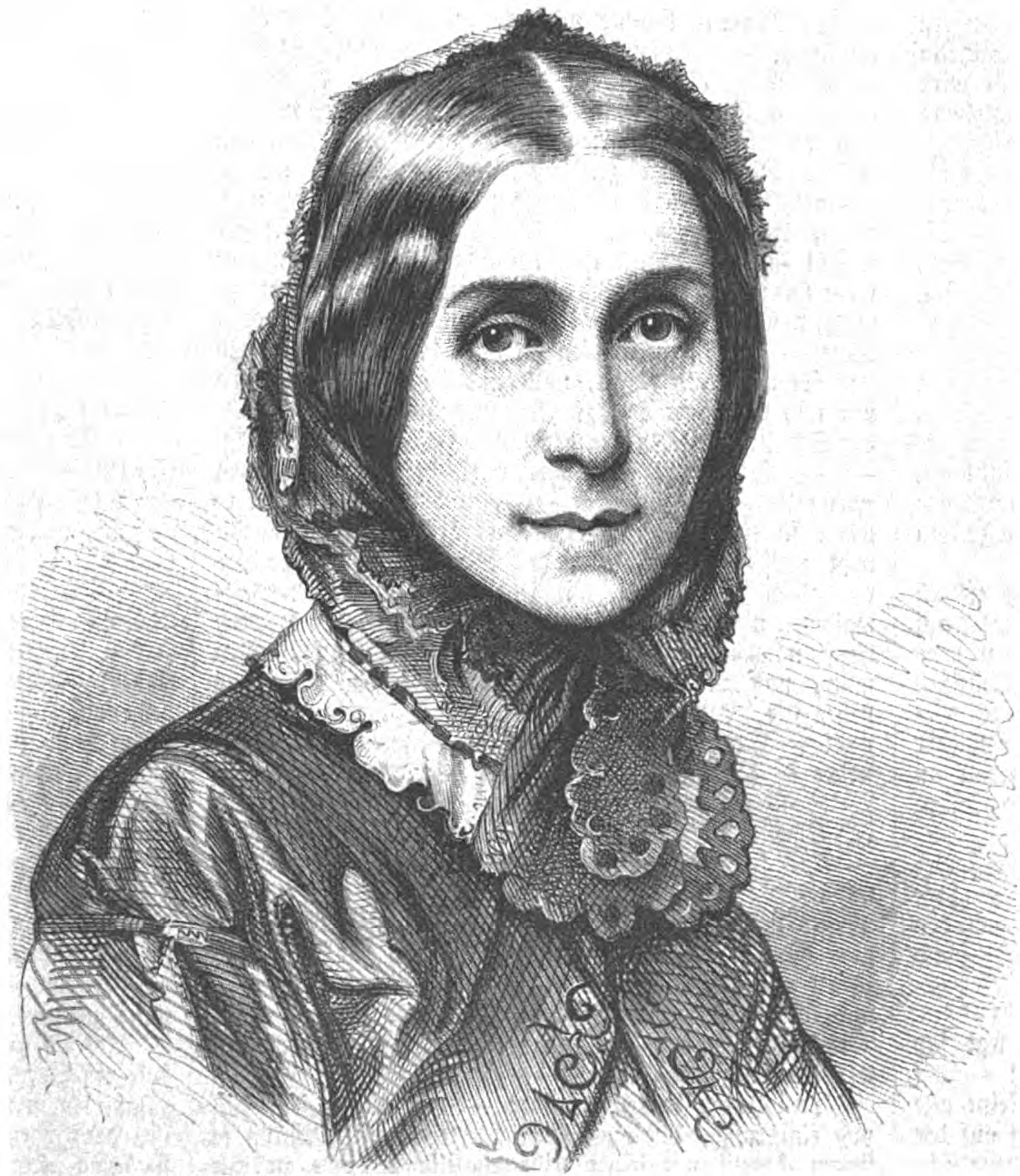 Elise Polko, deutsche Dichterin im 19. Jh.